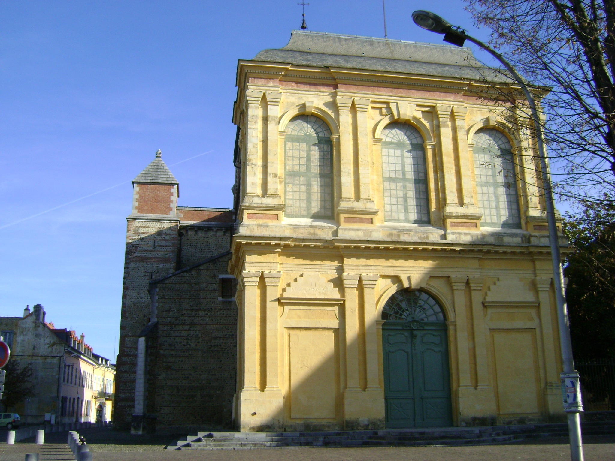 Cathédrale Notre-Dame-de-la-Sède, Tarbes, Hautes-Pyrénées. Façade occidentale.